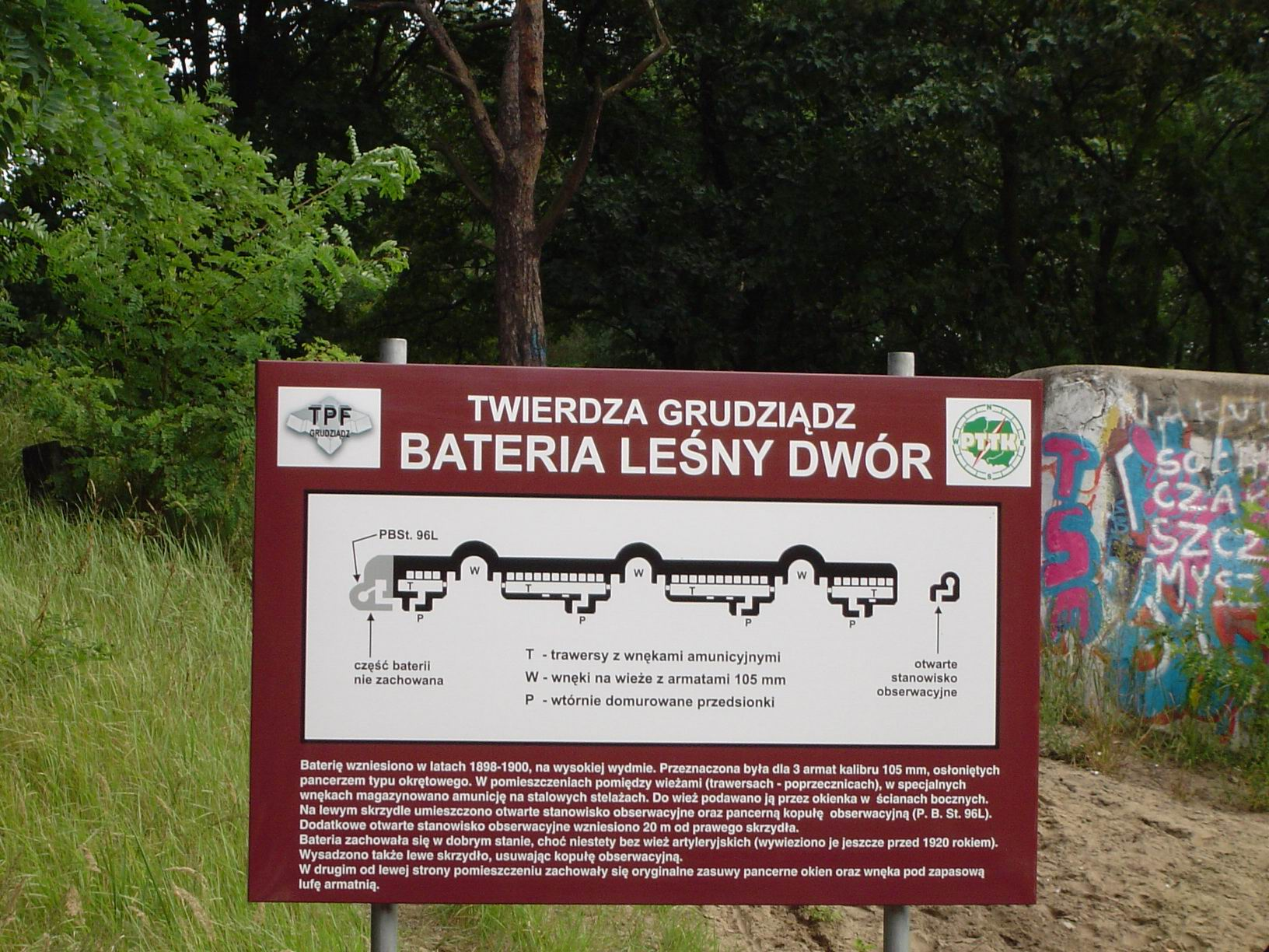 Bateria Półpancerna "Leśny Dwór" w Grudziądzu-tablica informacyjna. Prussian Battery "Waldhof" in Grudziądz.